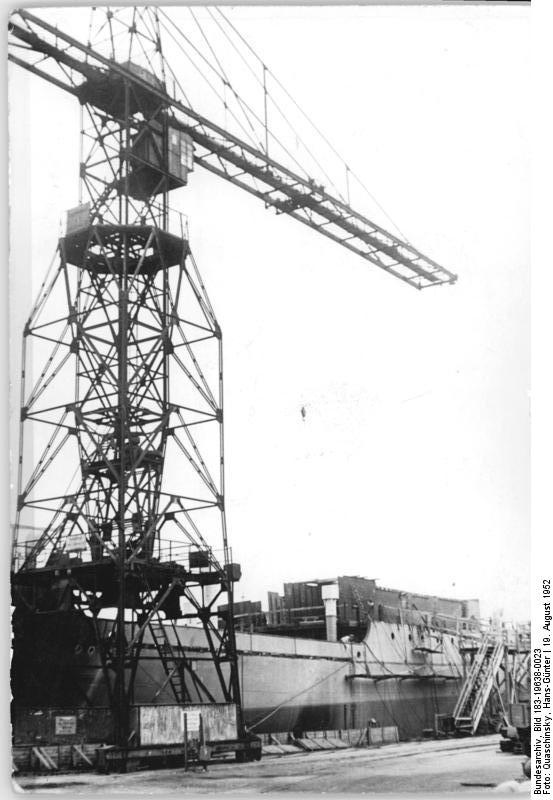 Rostock, Neptun-Werft, Ausrüstung Zentralbild-Quasch.-19.8.1952 Aus der Arbeit der Neptun-Werft. Zu den 66 SAG-Betrieben, die von der Sowjetunion an die Regierung der DDR übergeben wurden, gehört auch die Neptunwerft in Rostock, die größte Werft unserer Republik. Die Kollegen der Neptun-Werft wollen das Loggerprogramm für 1952 mit der Ablieferung des 54. Loggers am 20. November vorfristig erfüllen und mit der Erprobung des ersten Frachters am "Tag der Aktivisten" beginnen, sowie den Stapellauf des zweiten Frachters am 15. September erreichen. UBz: Der am 1. Mai 1952 vom Stapel gelaufene Frachter wird in der Ausrüstung fertiggestellt.